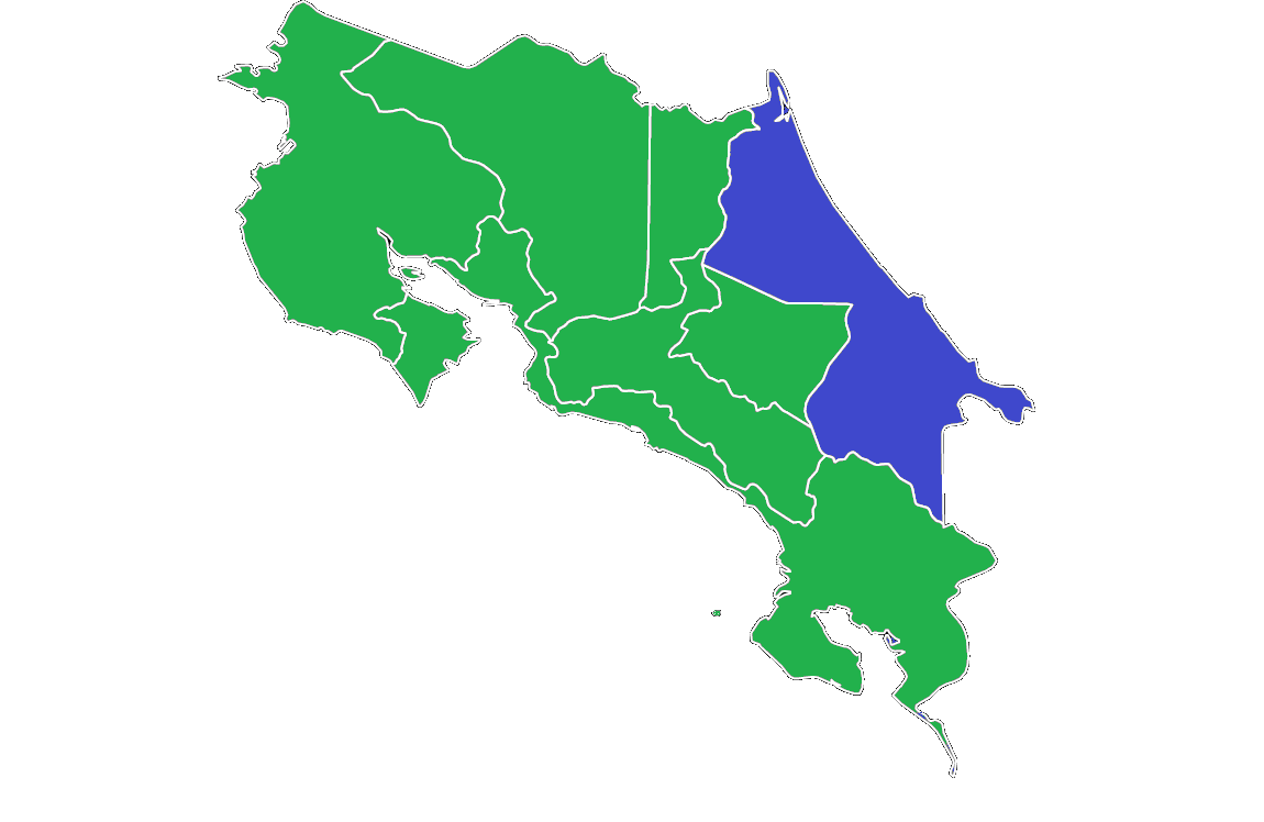 Resultados electorales provinciales 1962, fuente